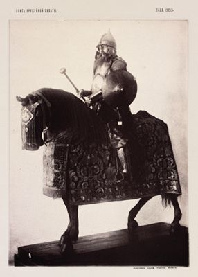 Московский воевода XVII века, 1885-1887 гг., Фототипия художника М.М. Панова, Архив Музеев Московского Кремля, Фонд фотодокументов, № 353 Moscow's Voevoda in Mirror Armour with Horse bareded by Lamellar Armour